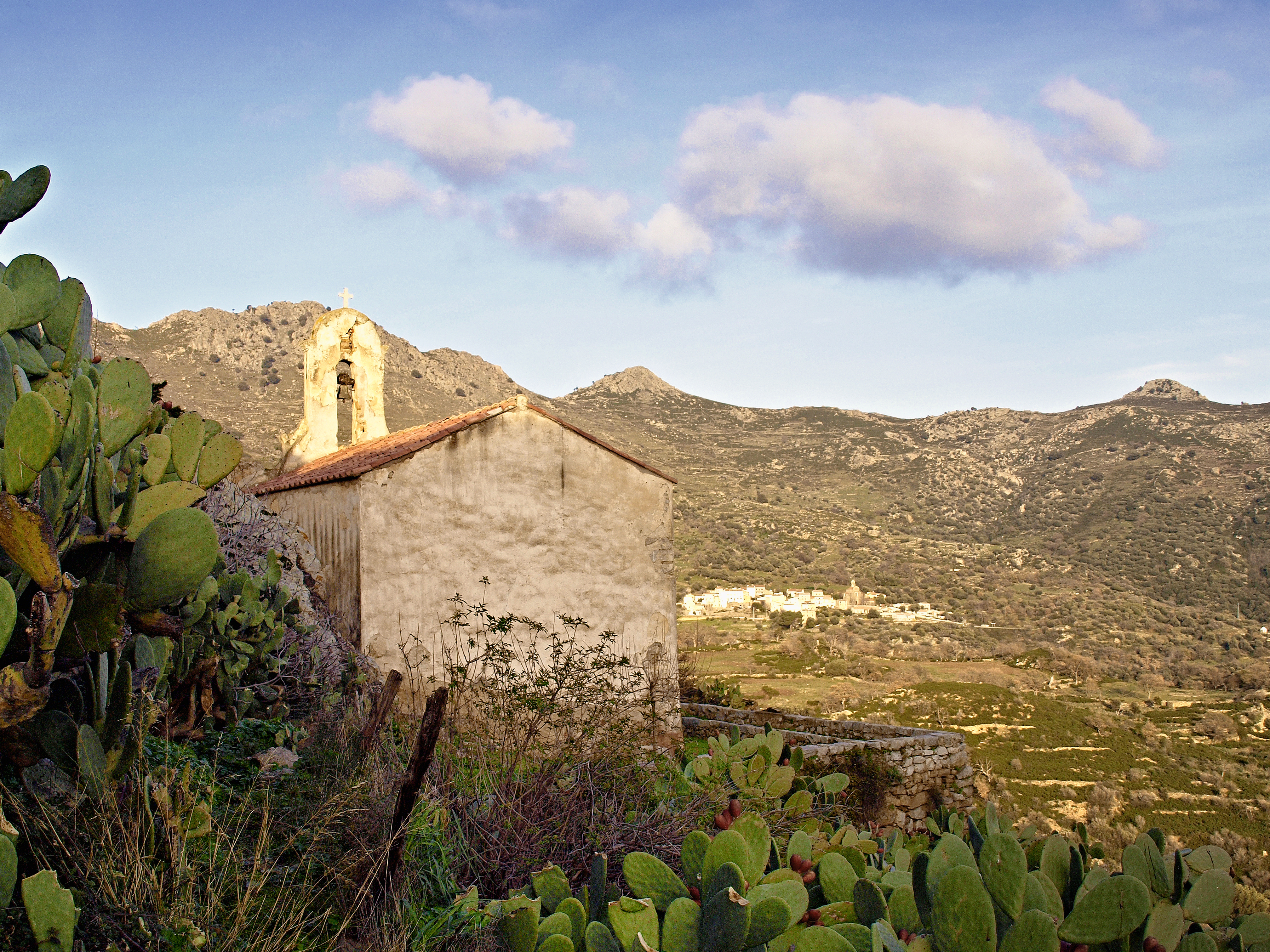 Montegrosso, Balagne (Corsica) - Chapelle St-Joseph à Montemaggiore